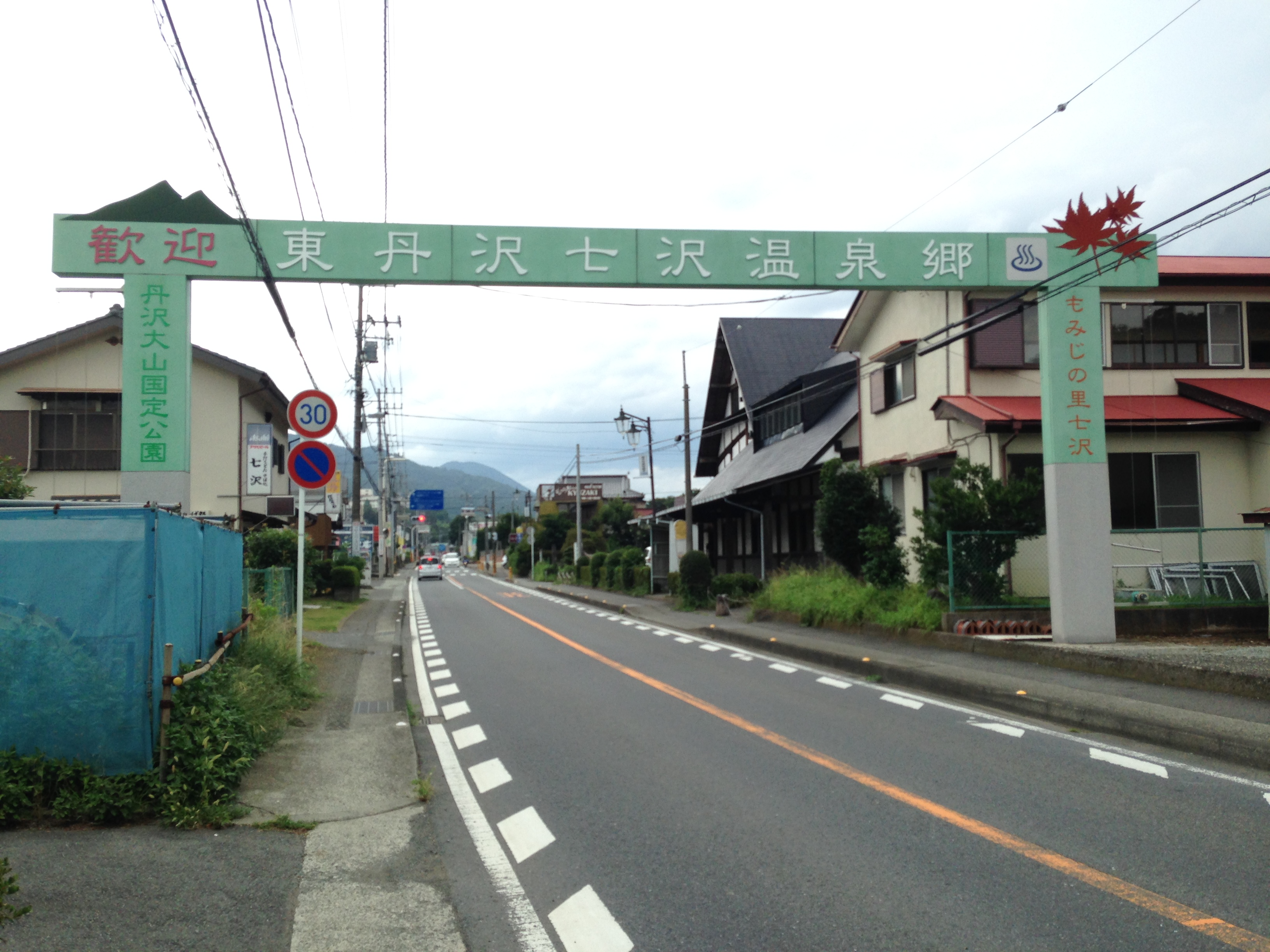 七沢温泉郷のゲート（表）。